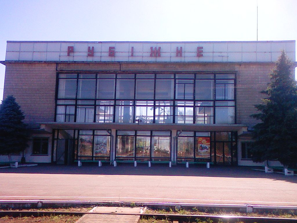 ж/д станция